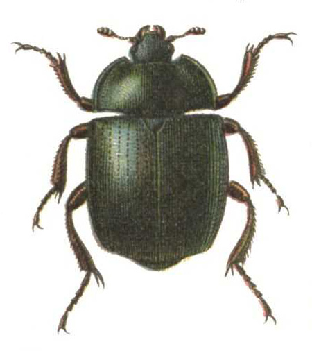 Spaherites glabratus Fabricius, 1792